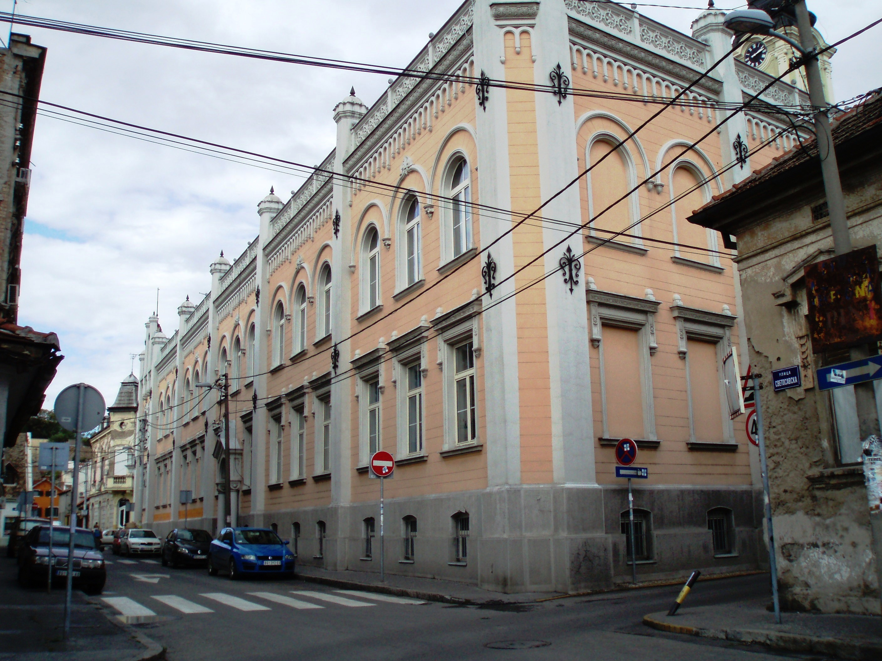 Dom srpske pravoslavne opštine u Zemunu, Svetosavska 22, Autor fotografije: Nicolo